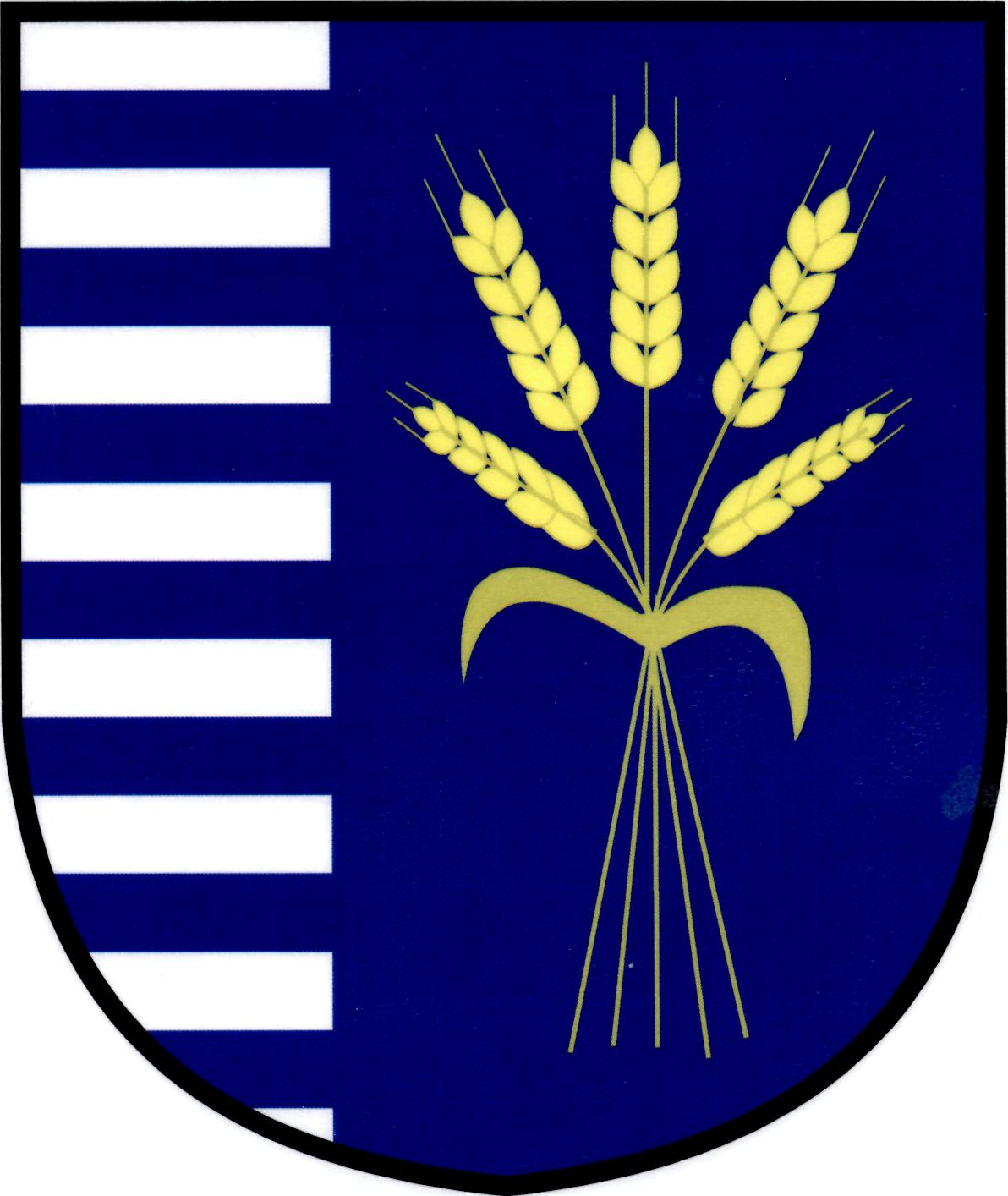 Znak obce Velká Dobrá